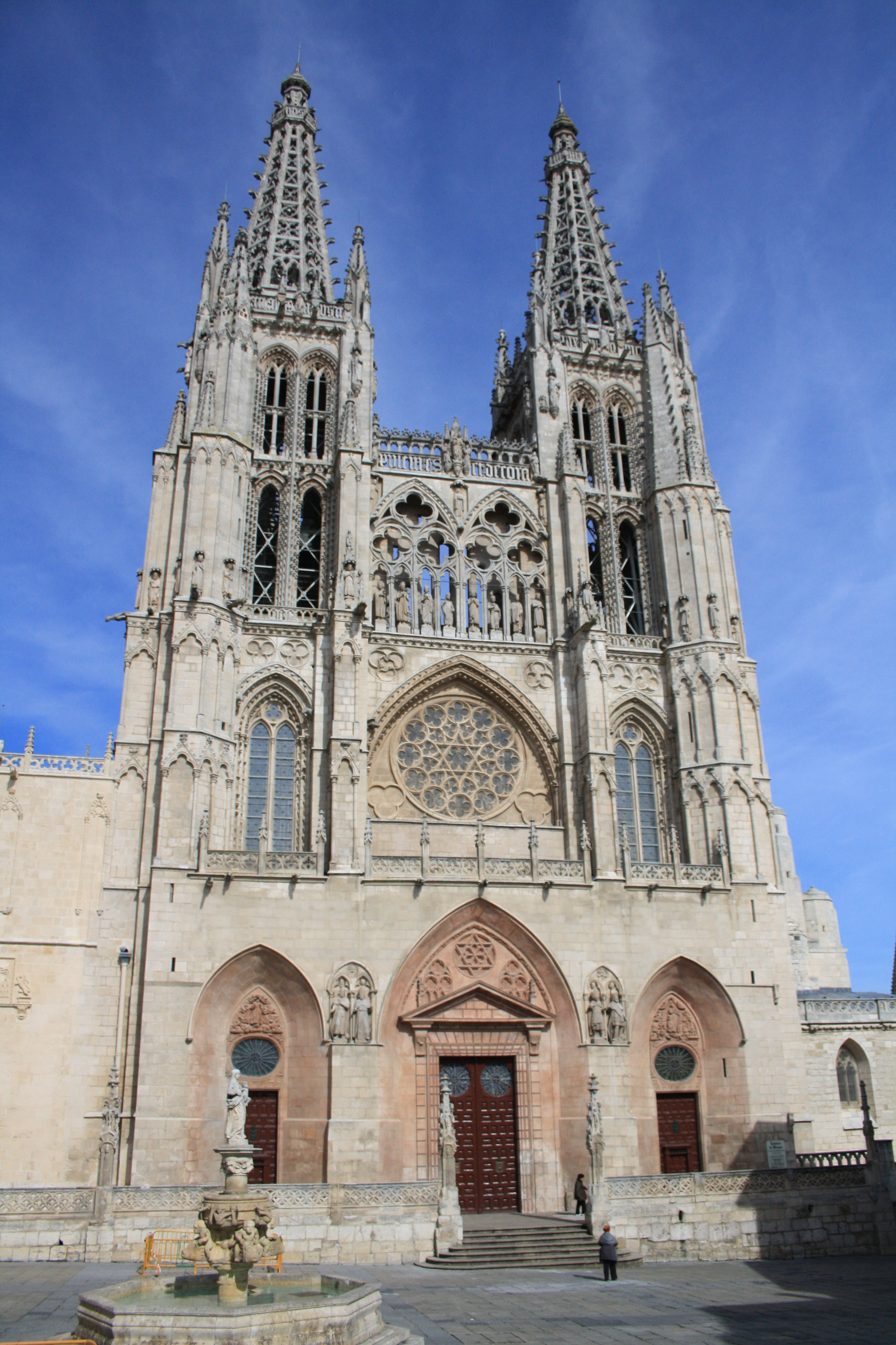 Catedral de Burgos - Parte Frontal 4